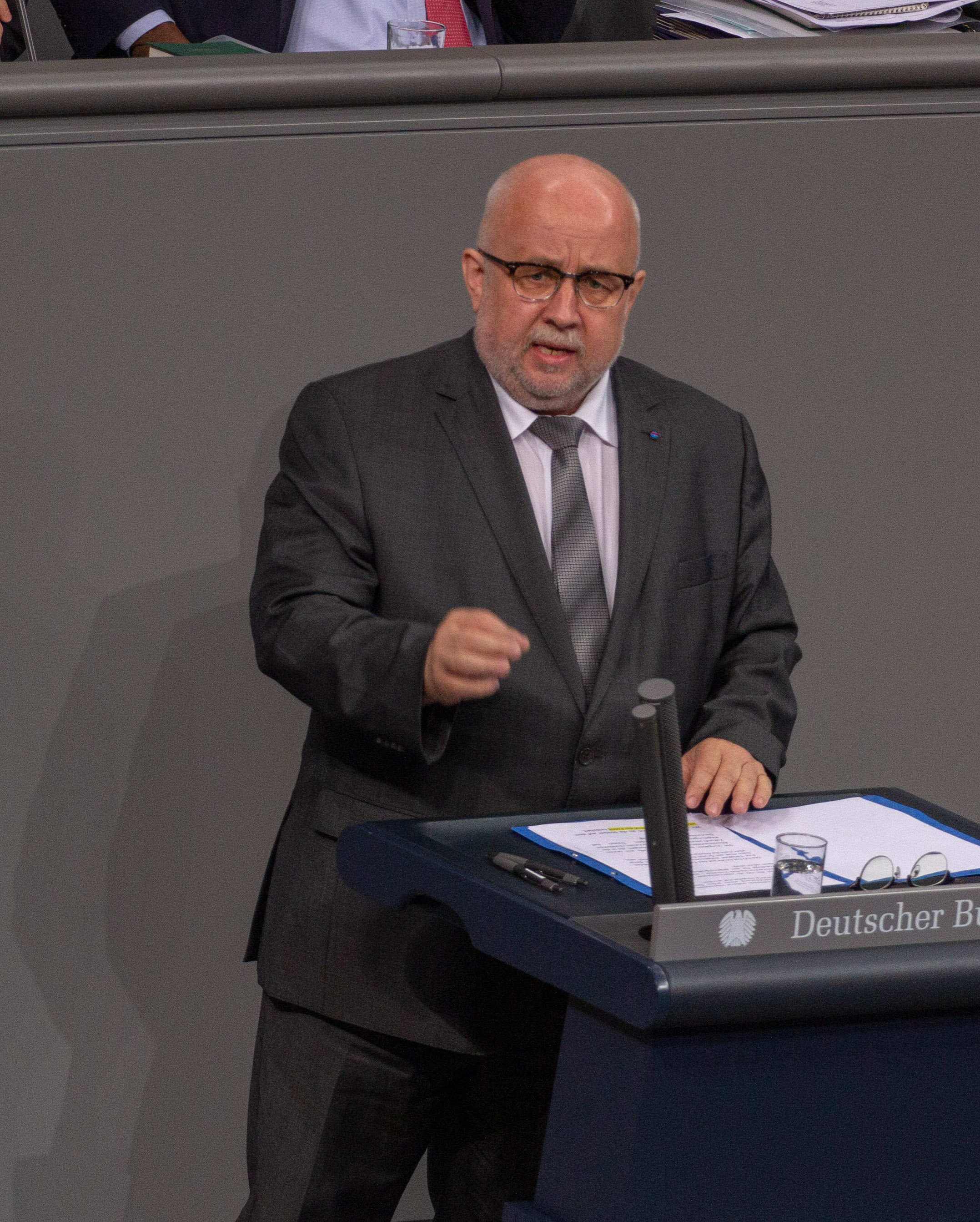 Jürgen Pohl, Mitglied des Deutschen Bundestages, während einer Plenarsitzung am 11. April 2019 in Berlin.